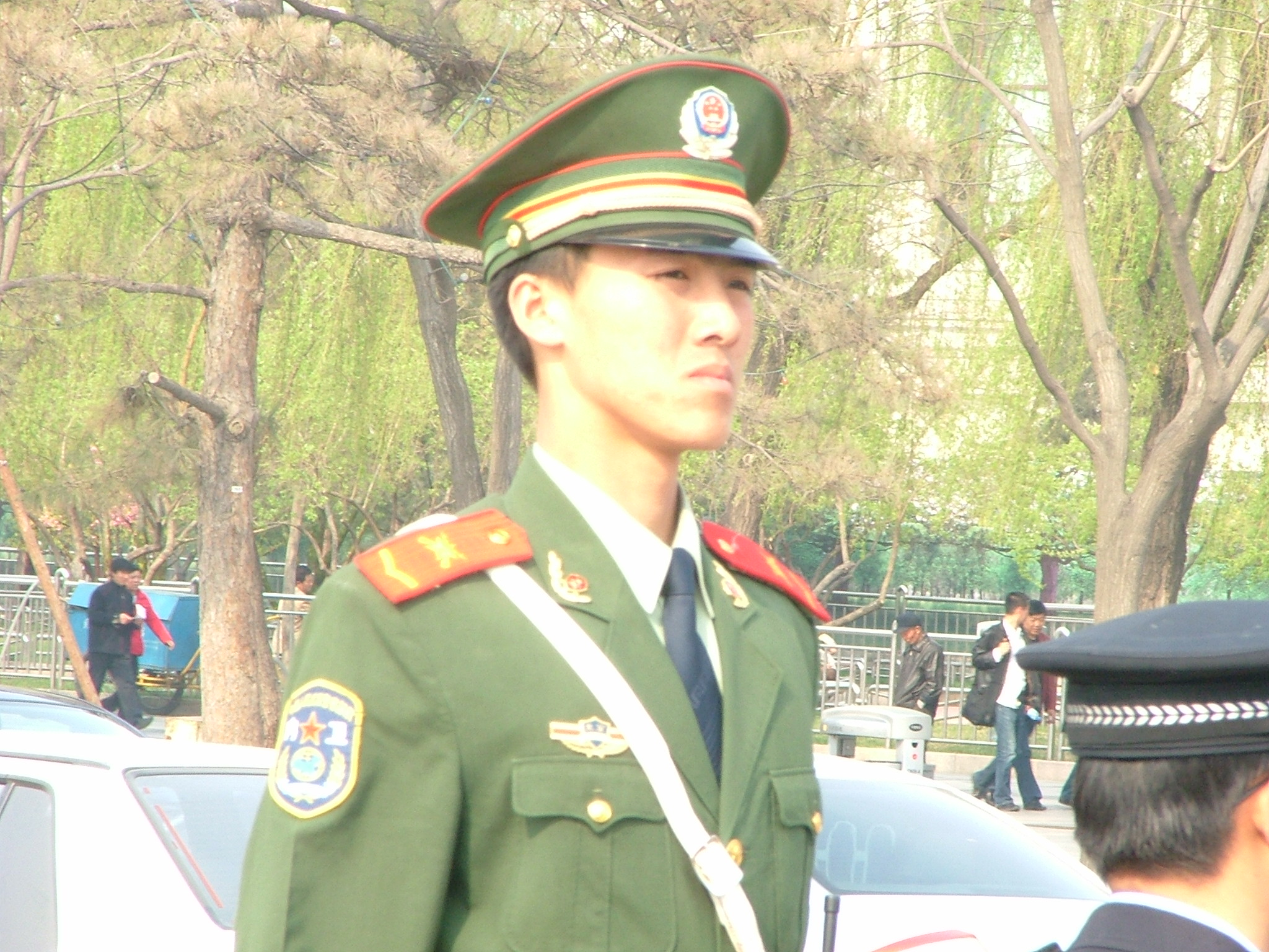 Agent de la Police Armée du Peuple sur la Place Tienanmen a Pékin